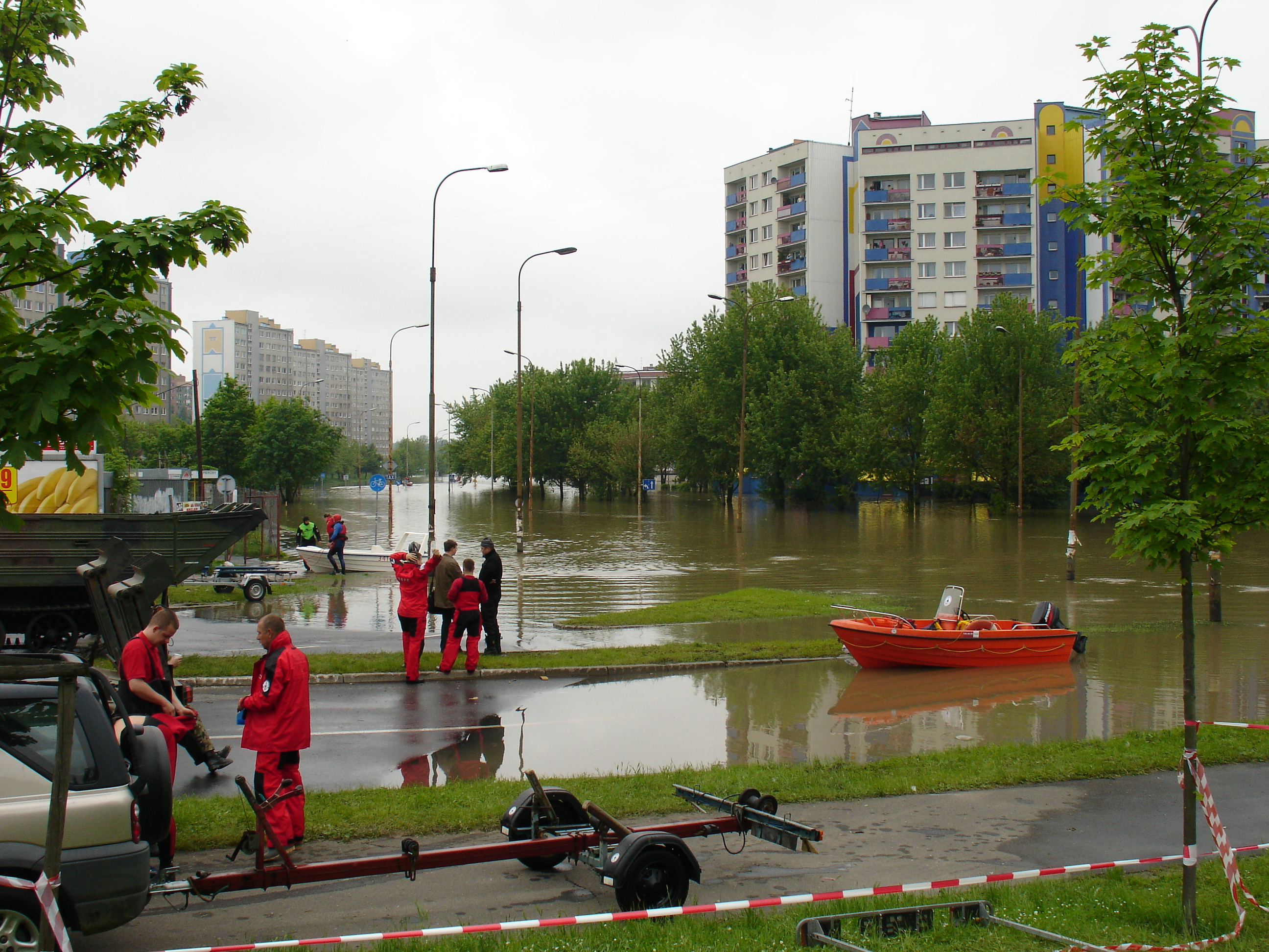 Wrocław, osiedle Kozanów. Niedziela 23-05-2010, godz. 9-11.